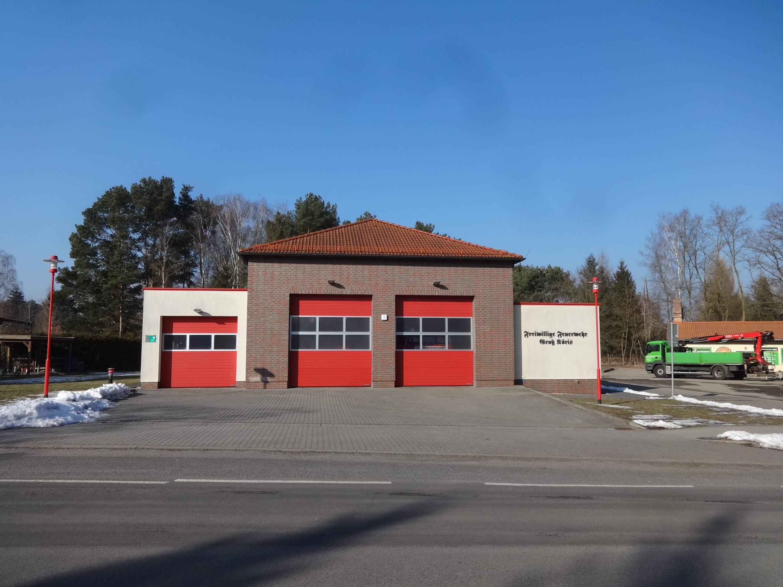 Neubau des Feuerwehrgebäudes in Groß Köris